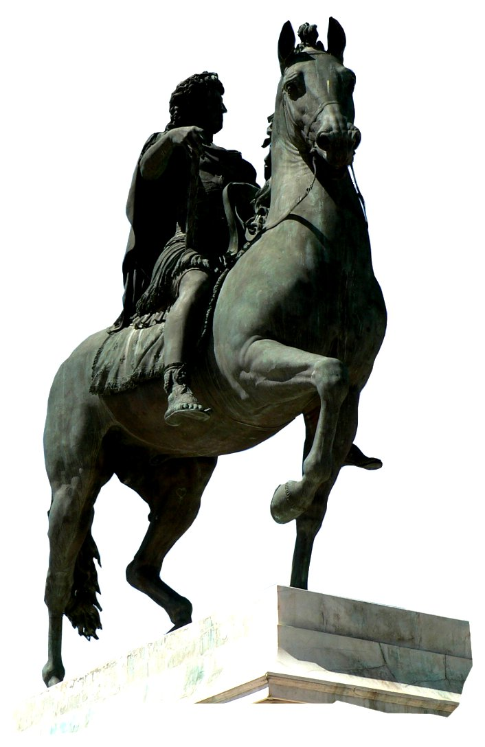 Statue équestre de Luis XIV, Place Bellecour à Lyon